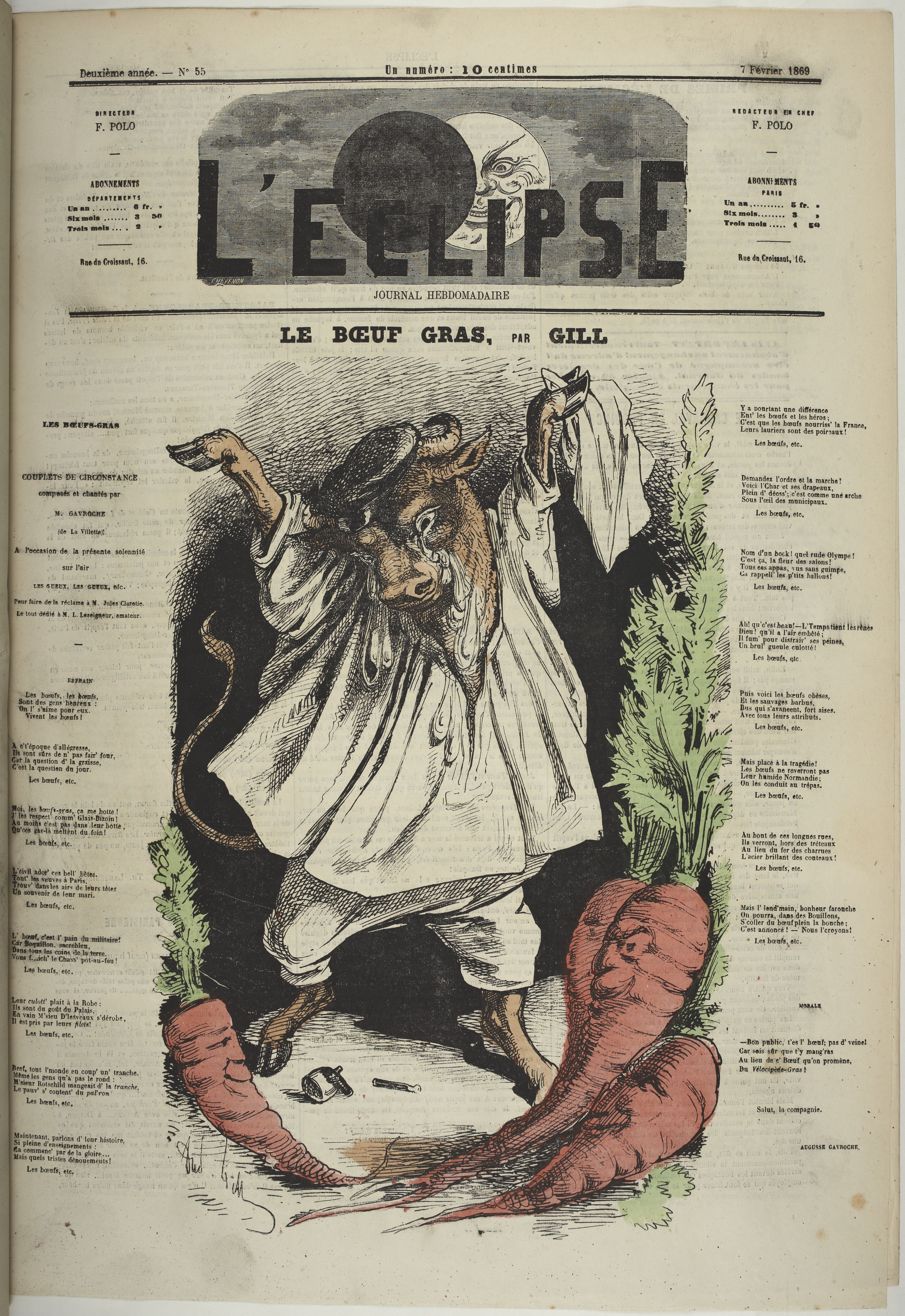 Le Bœuf Gras du Carnaval de Paris